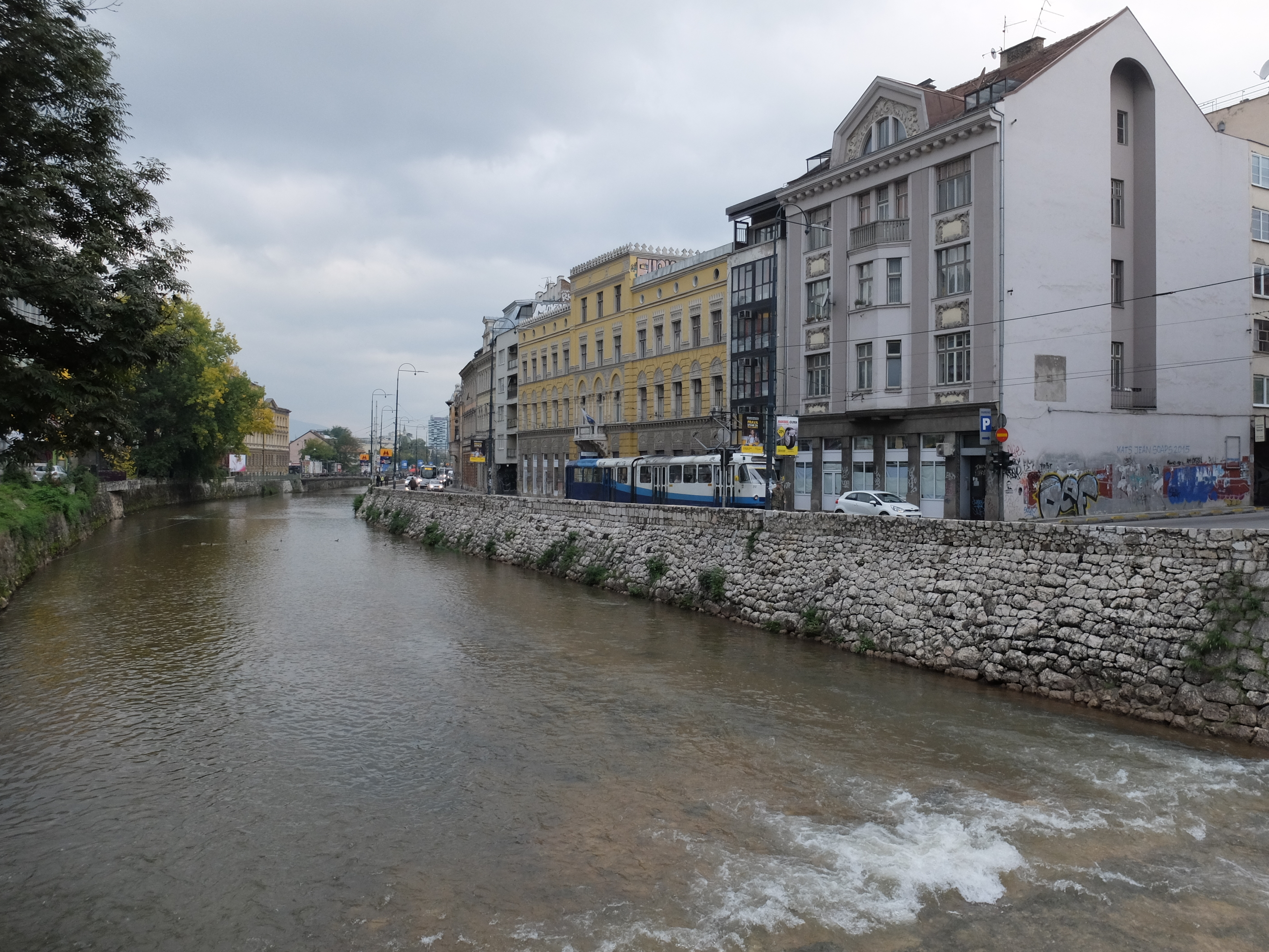 Straßenbahn Sarajevo Nr. 212 (ČKD TatraTyp K2YU) auf der Obala Kulina bana am Fluss Miljacka